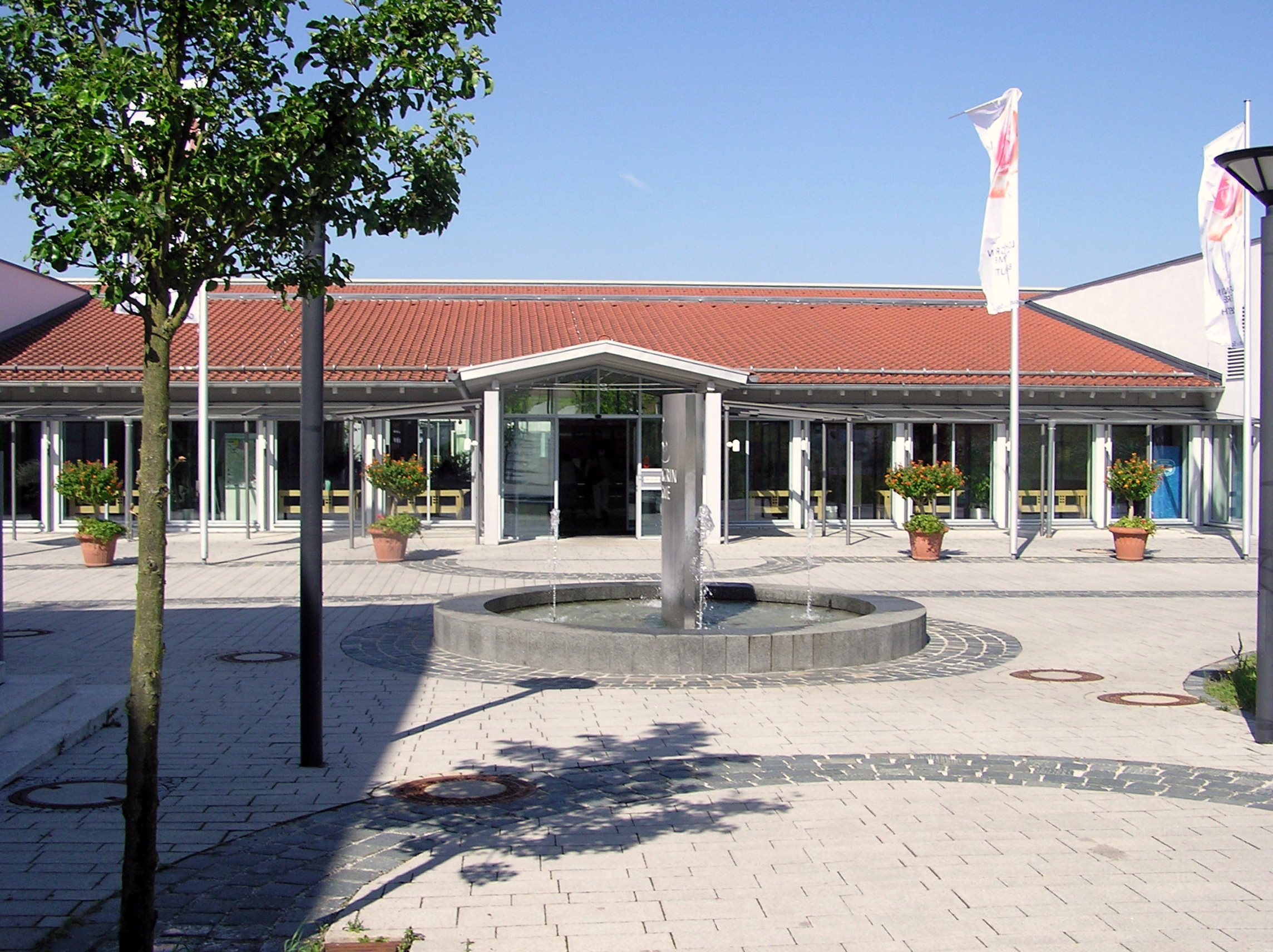 Lohengrintherme Bayreuth, Eingangsbereich